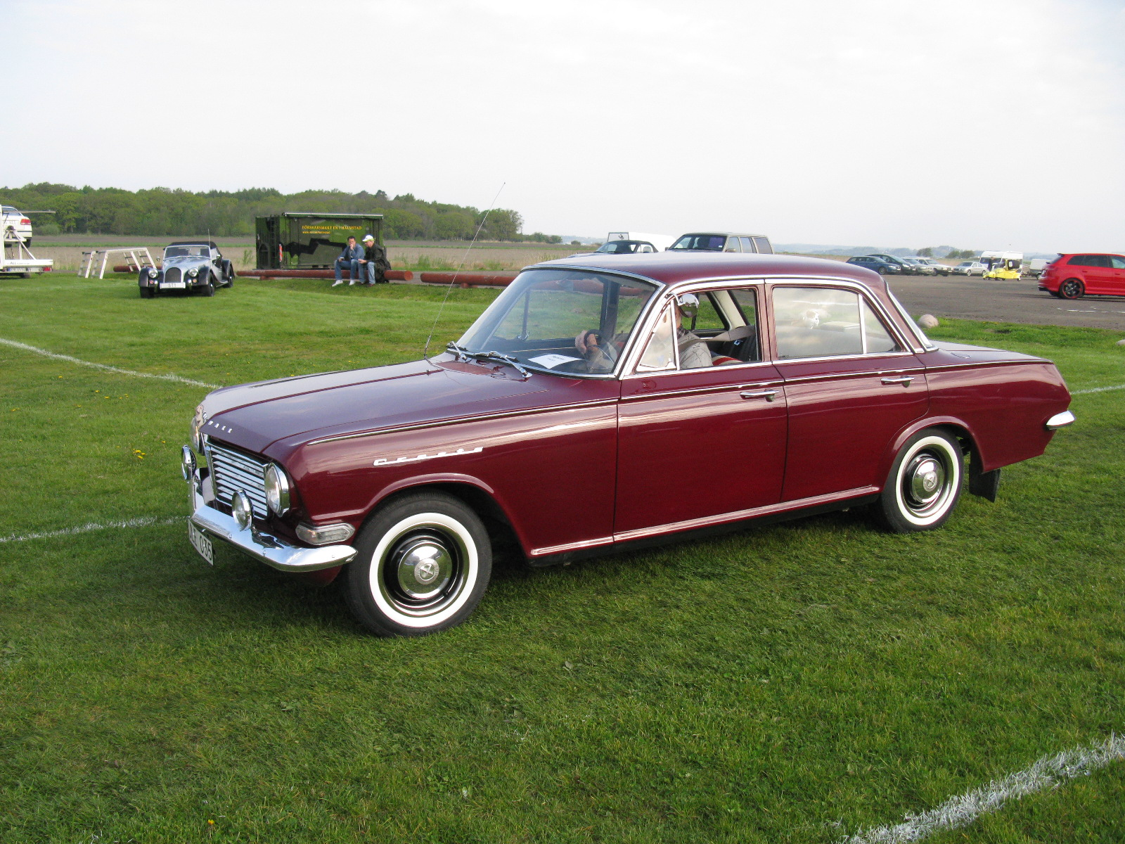 Vauxhall Cresta